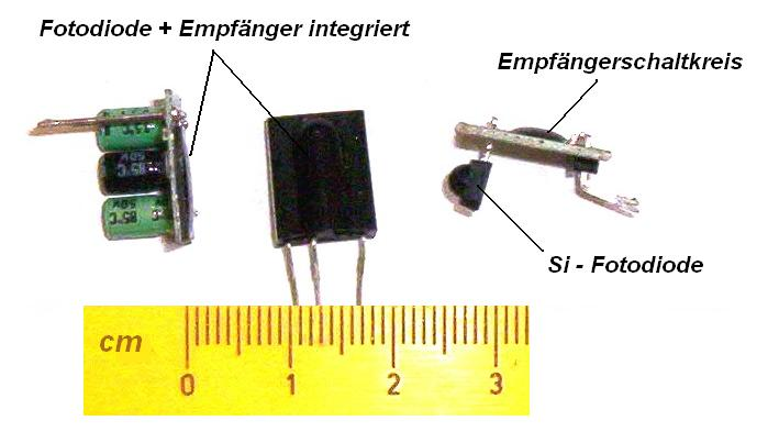 verschiedene Ausführungsformen von IR-Fernsteuer-Empfängern